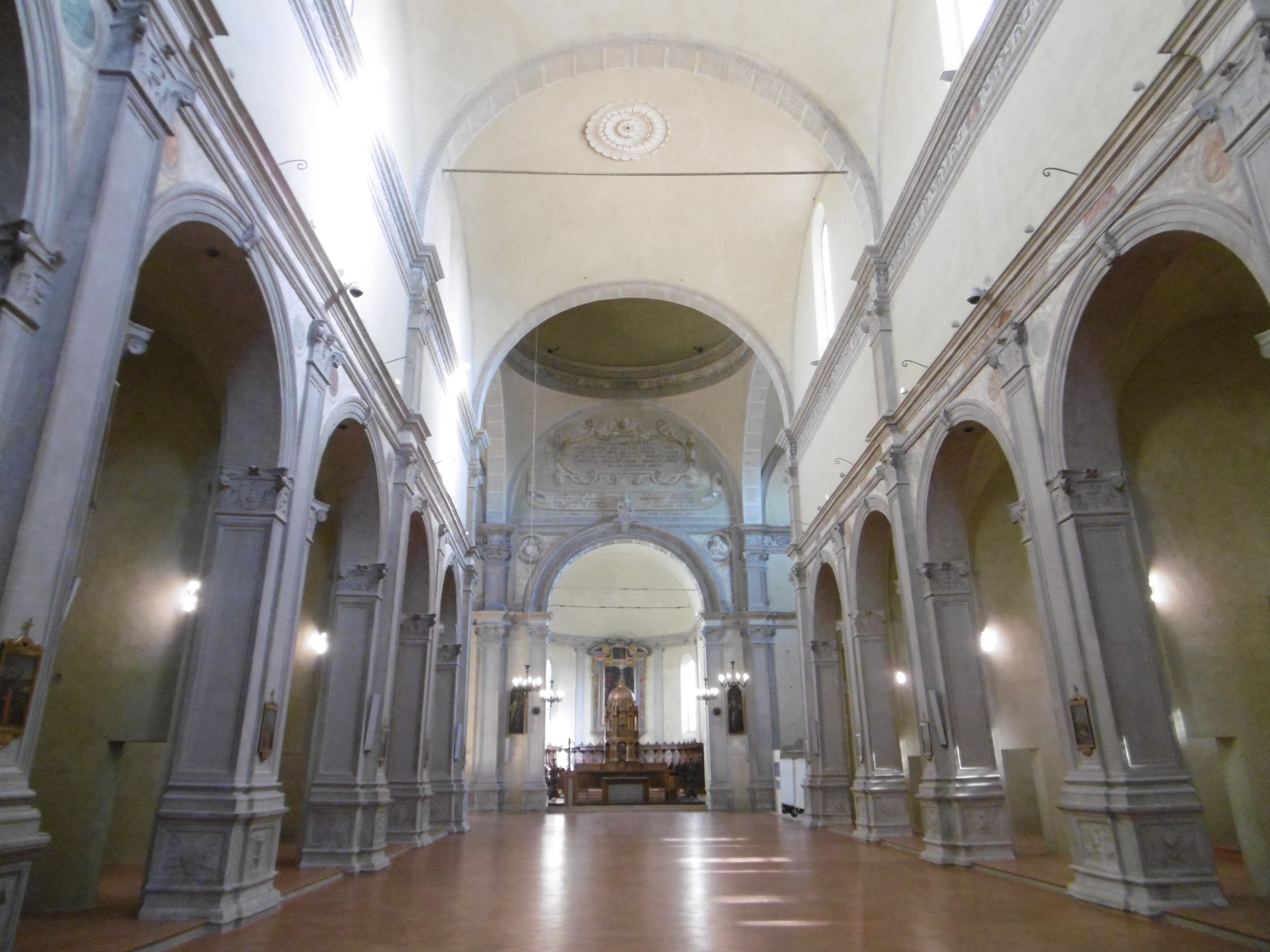 Chiesa di San Cristoforo alla Certosa